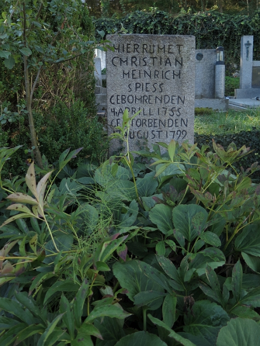 Náhrobek spisovatele Spiesse, hřbitov, Bezděkov (okres Klatovy).